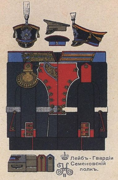 Форма обмундирования парадная лейб-гвардии Семёновского полка. 1910 год.